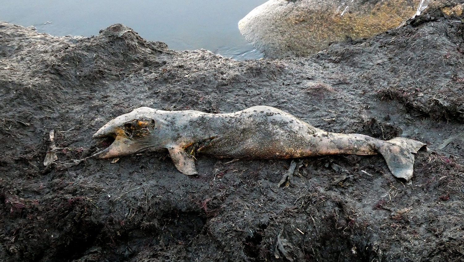 Ett kadaver efter en ung Tumlare, 97 cm lång, ca 5 kg tung. Ystads Saltsjöbad 19 aug 2020.